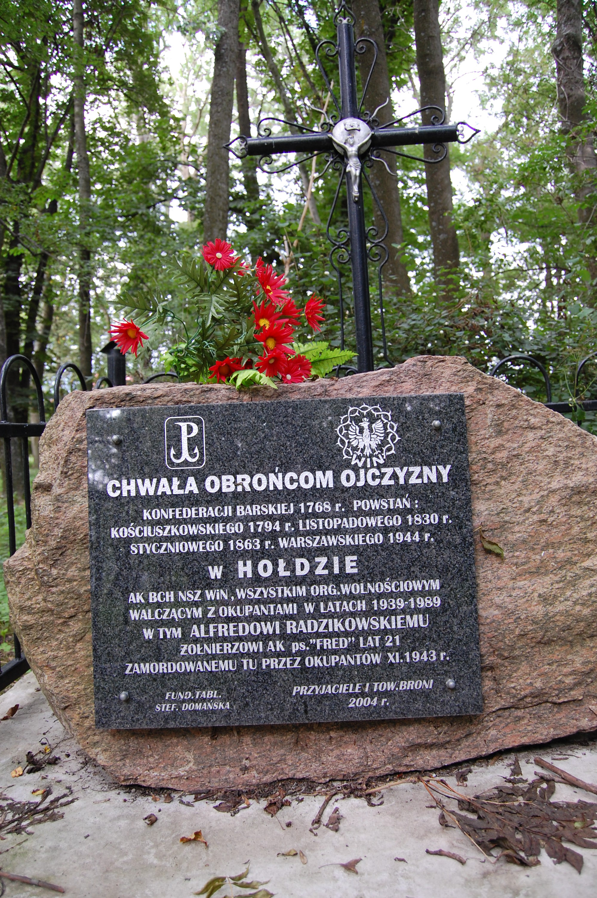 Widok ogólny pomnika w parku w zespole pałacowym w Wilczynie